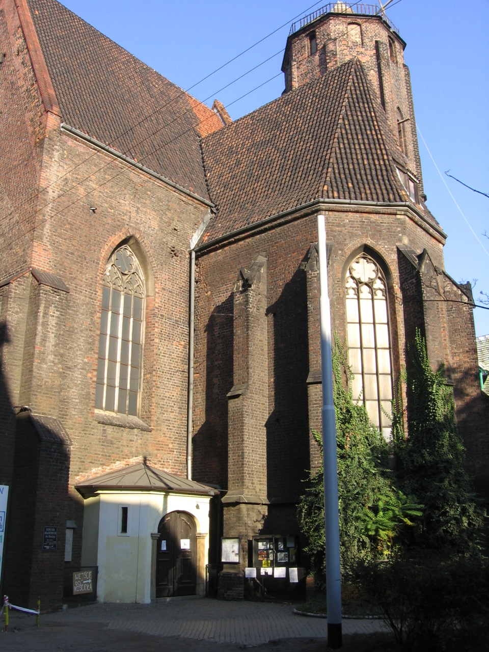 Wrocław, Poland St.Matthew's church, from Szewska Street